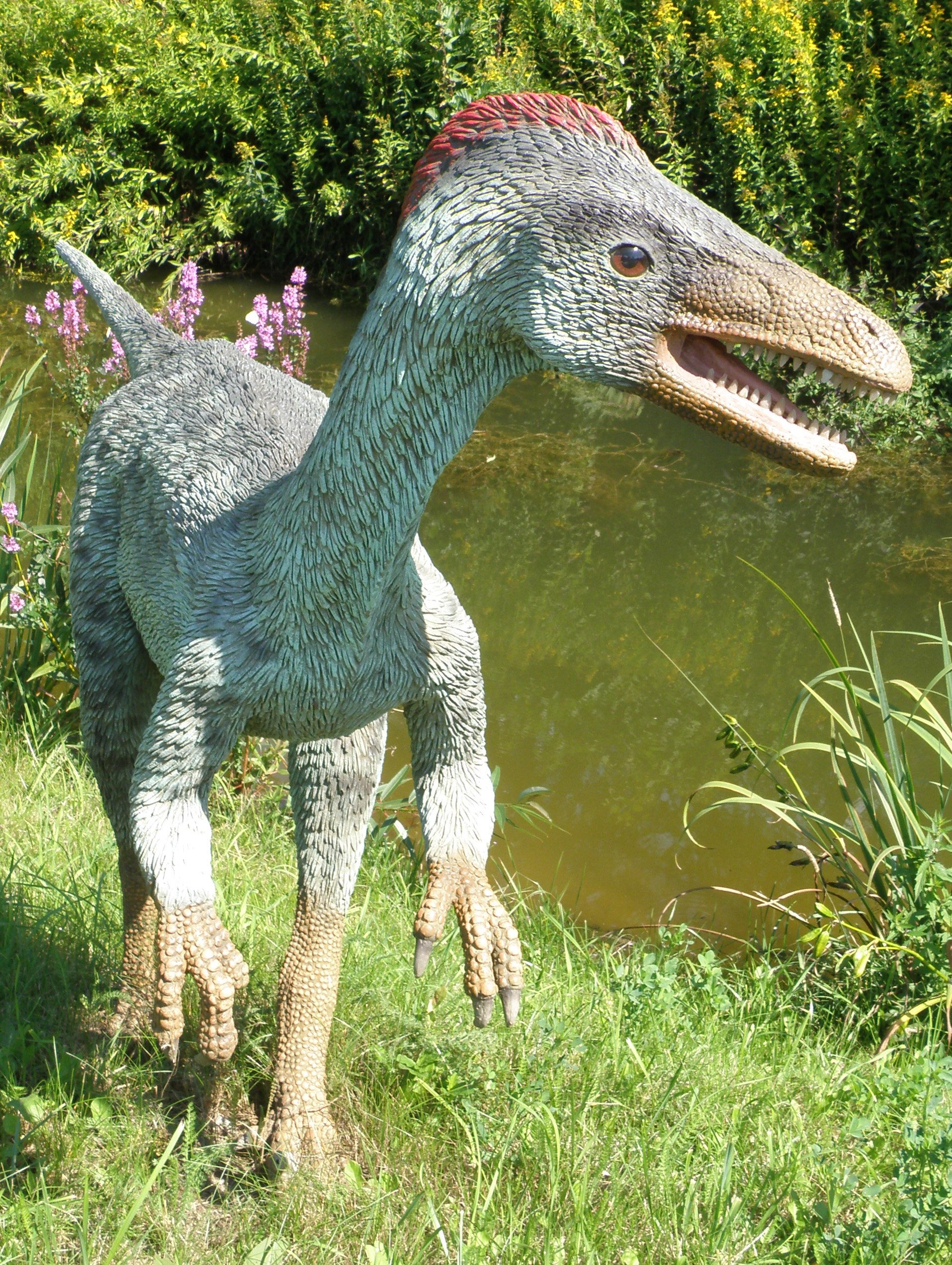 JuraPark Bałtów - Park Dinozaurów - Troodon